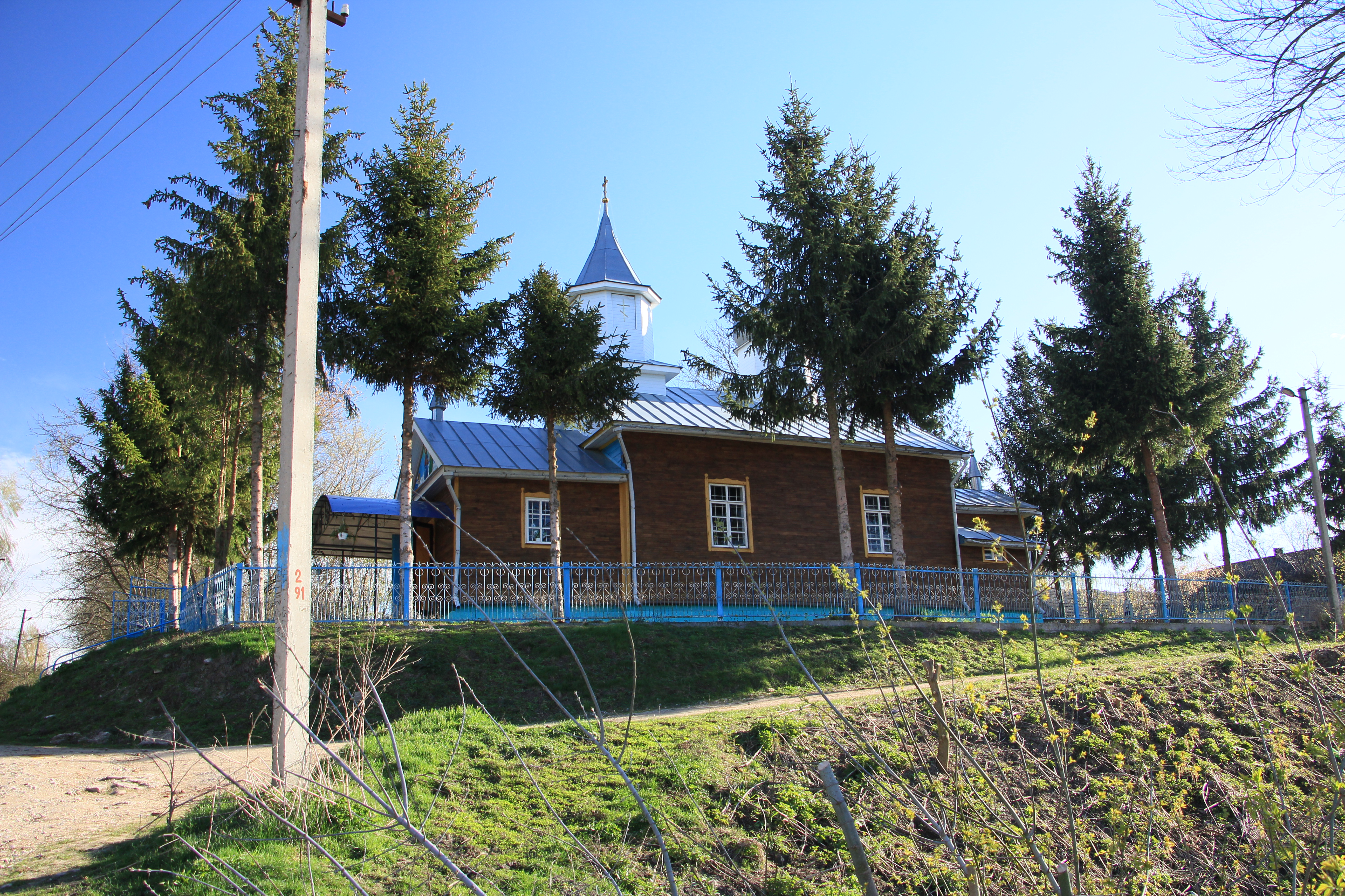 Дерев'яна церква в селі Кудлаївка Шумського району Тернопільської області